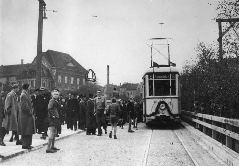 Halle/Saale, Straßenbahn überquert Brücke Illus Neue Brücke in Halle/Saale Die wieder hergestellte Giebichsteins-Saalebrücke in Halle/Saale wurde am 1. Mai dem Verkehr übergeben. U.B.z.: der erste geschmückte Straßenbahnwagen überquert die Brücke. 14.5.48 [Herausgabedatum] 1482-48